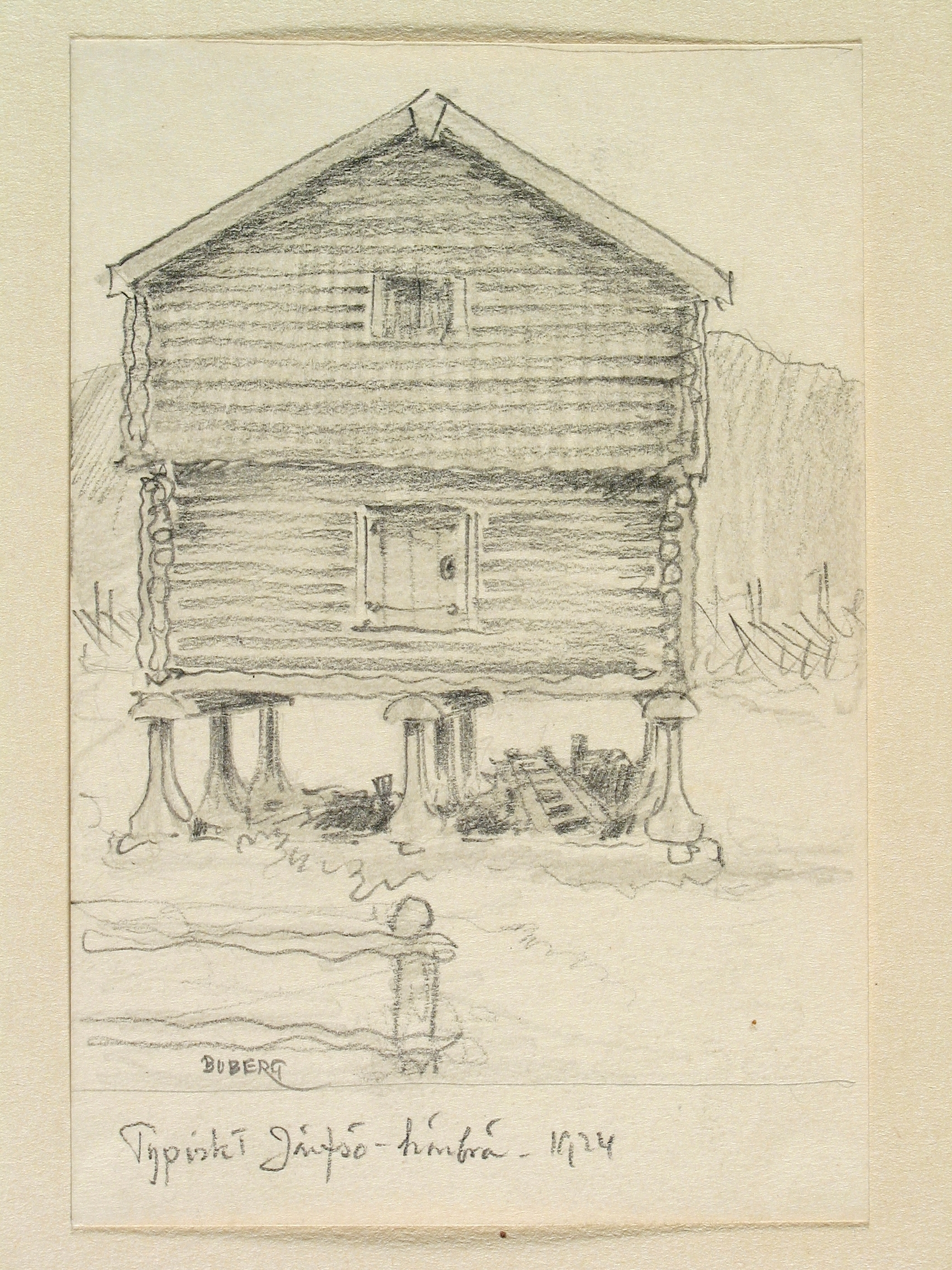 Hälsingland, Järvsö sn. "Typiskt Järfsö-härbrä". Teckning av Ferdinand Boberg Depicted place: Järvsö sn. (Ortnamn därutöver), Sweden (Q34)